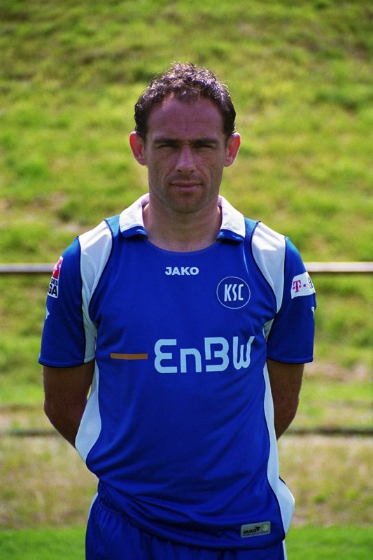 Sanibal Orahovac